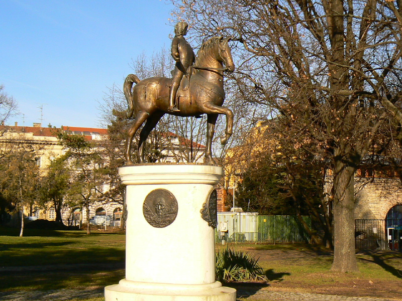 A Móra Ferenc Múzeum mögötti Tisza-parti sétányon 2001. augusztus 20-án avatták föl Lapis András bronz szobrát. Az alkotás az ifjú Mátyás trónra lépéséről szóló szegedi megegyezésnek és a Hunyadi családnak állít emléket. A 15 éves ifjú délcegen üli meg lovát. Az ovális mészkő posztamensen helyezték el Hunyadi János és Hunyadi László portré-tondóját, valamint a Hunyadiak címerét. Ez utóbbiakat Józsa Gábor vésnökmester, szobrász készítette.